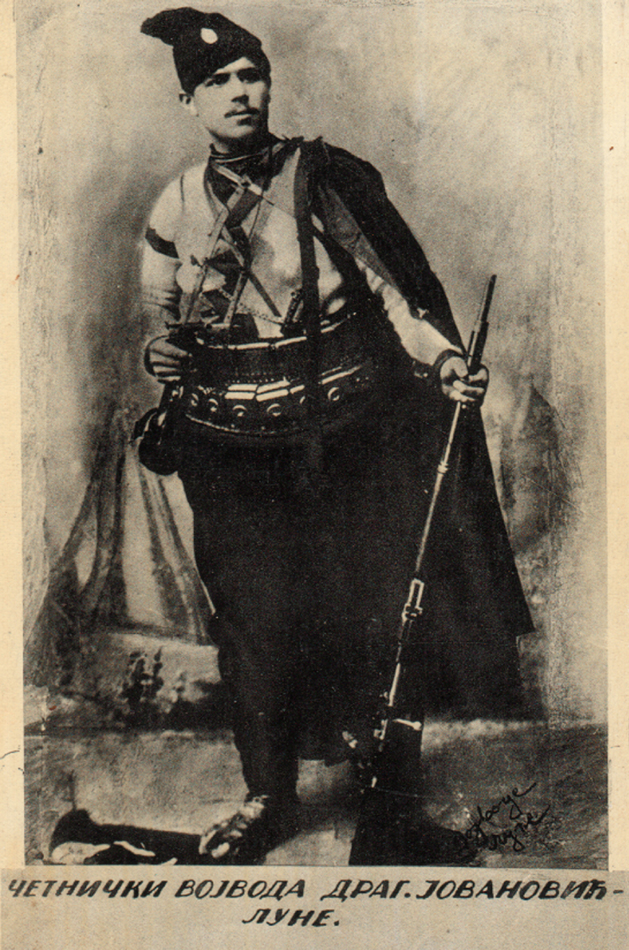 Српски (ћирилица): Војвода Драгутин Јовановић Луне